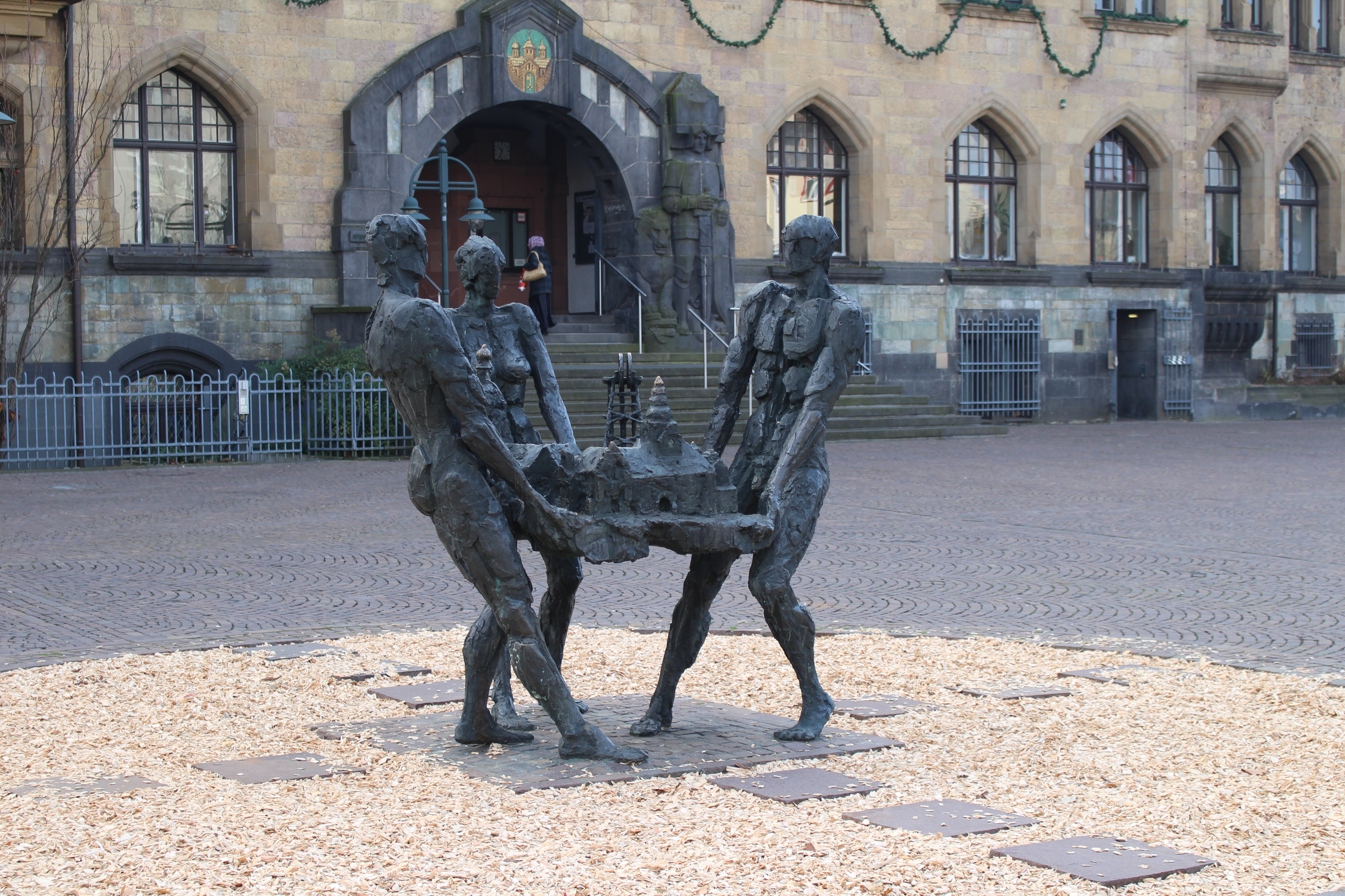 Brunnen "Bürger tragen ihre Stadt", Recklinghausen